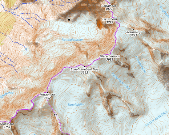 carte réalisée sur umap This map may be incomplete, and may contain errors. Don't rely solely on it for navigation.